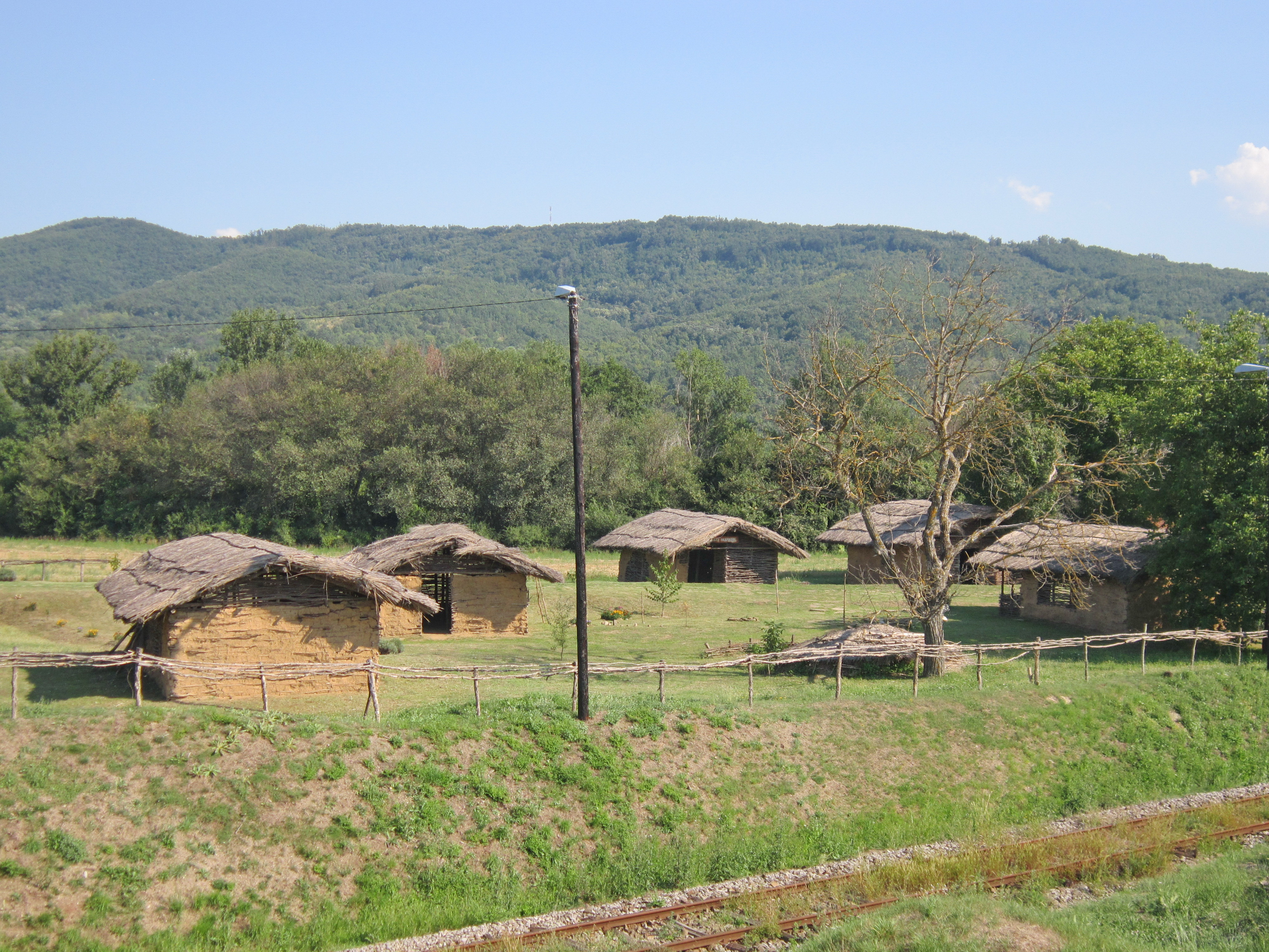 Српски (ћирилица): Археолошко налазиште Плочник